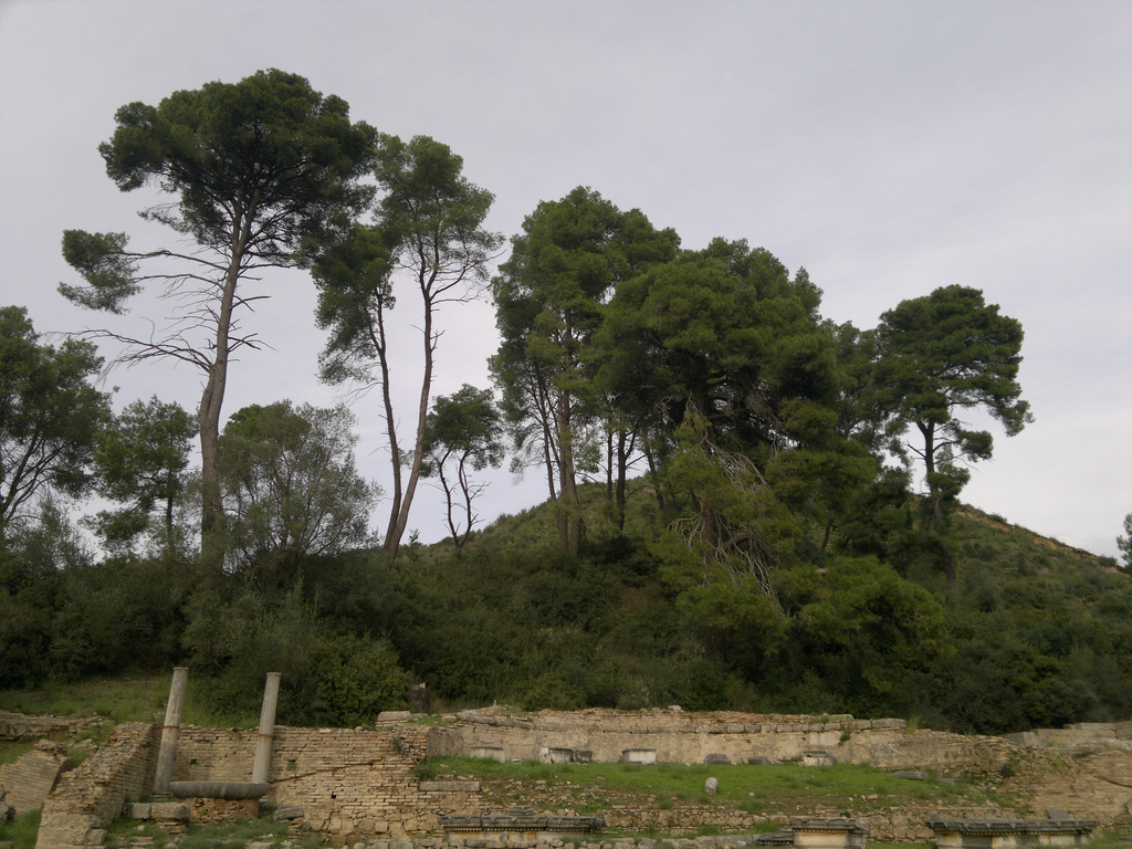 Ancient Olympia, Greece. Photo taken with Nokia N8 (12 Megapixel). Αρχαία Ολυμπία. Φωτογραφία που τράβηξα με το Nokia N8.